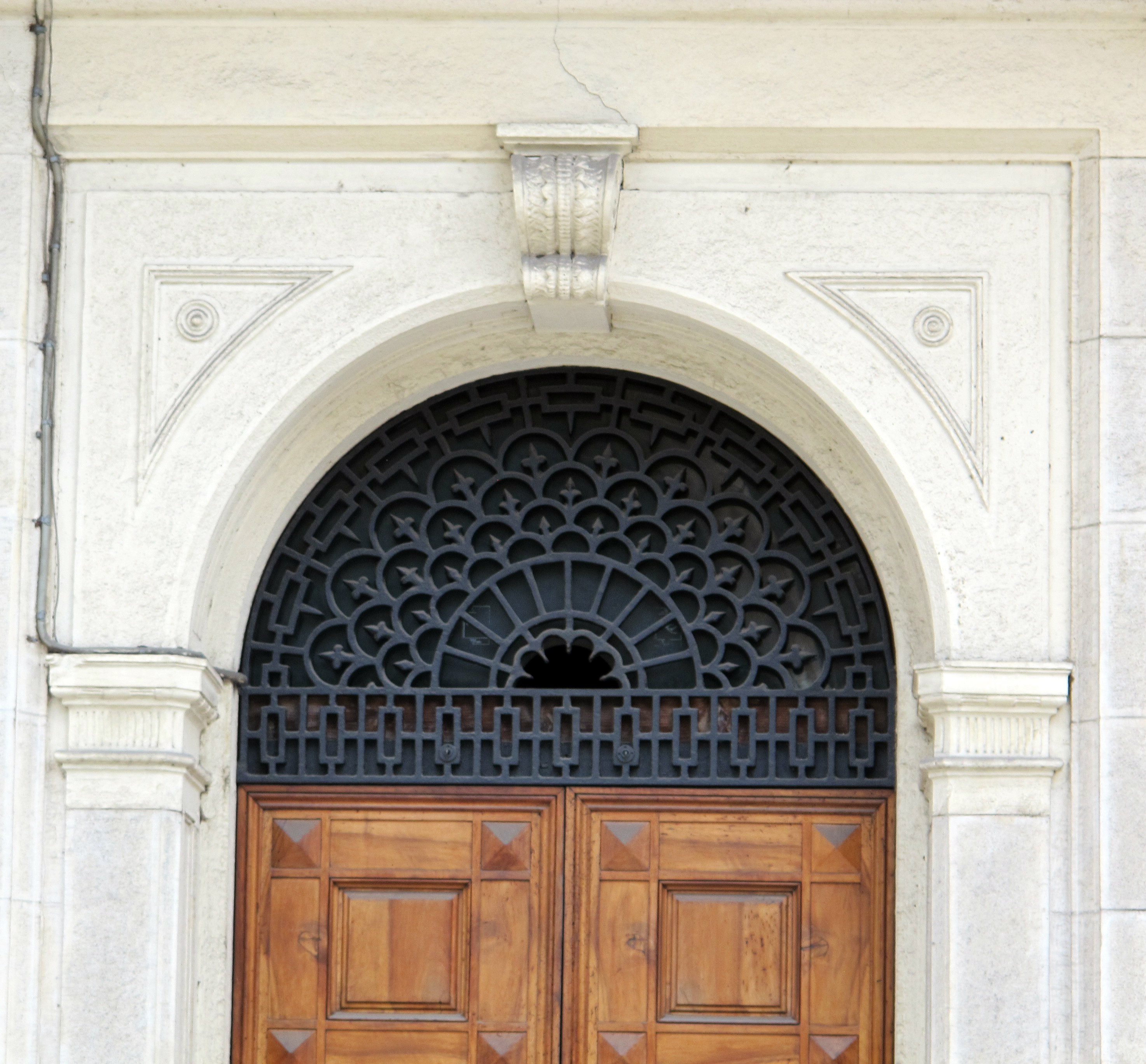 Piazza d'azeglio 29, Palazzina Tommaseo 03 portale